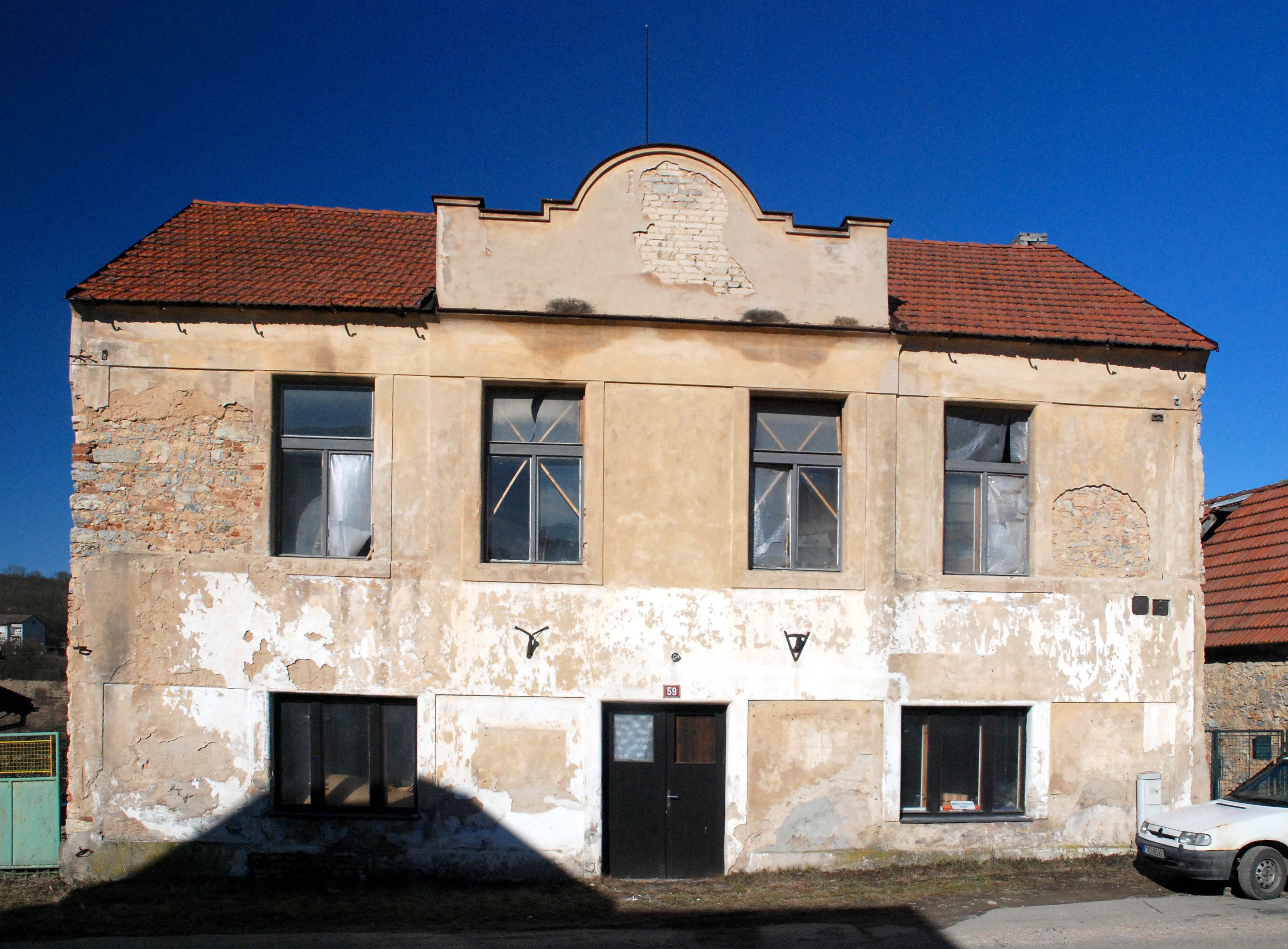 Bývalá synagoga v obci Mořina Project: Židovské památky.